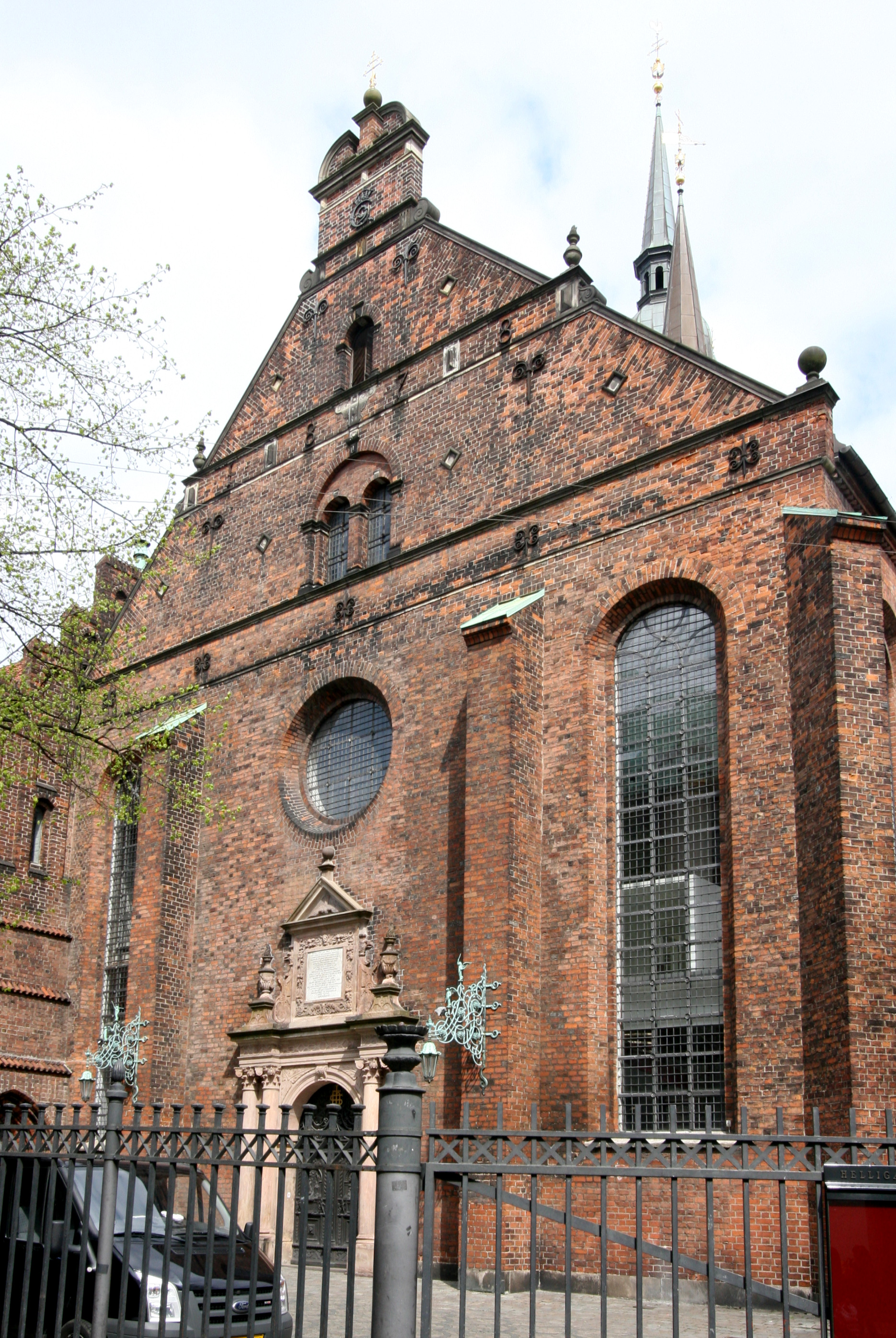 Helligåndskirken, Copenhagen, Denmark. From west.